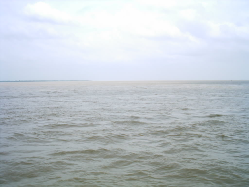 River Padma